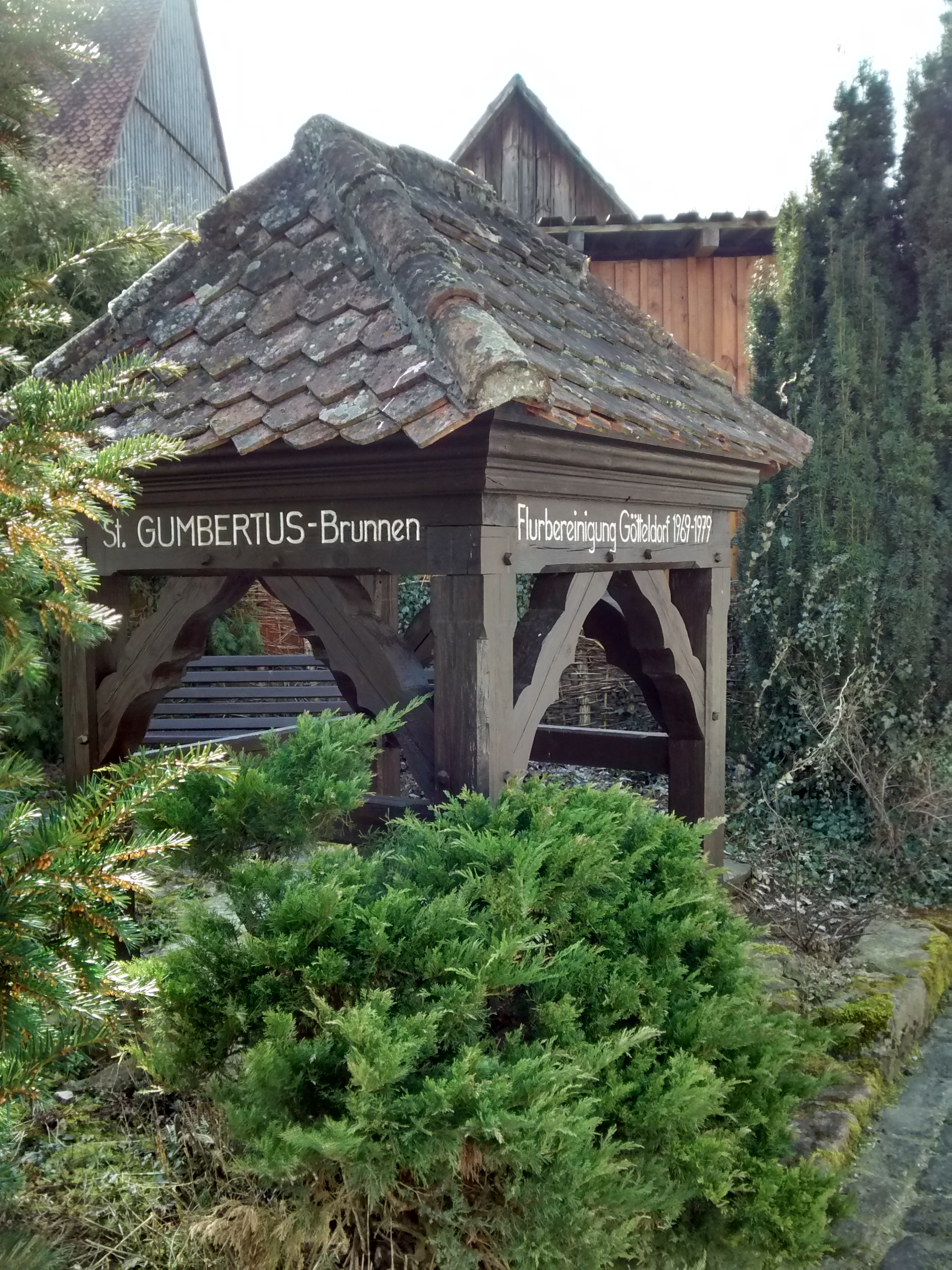 Götteldorf Gumbertus-Brunnen